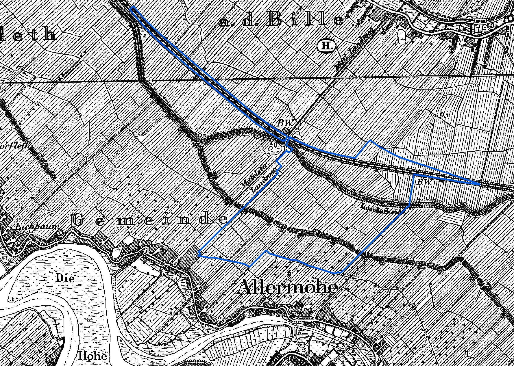 Naturschutzgebietes Allermöher Wiesen (blaue Line: Gebietsgrenze; Karte: Preußische Landesaufnahme von 1880)